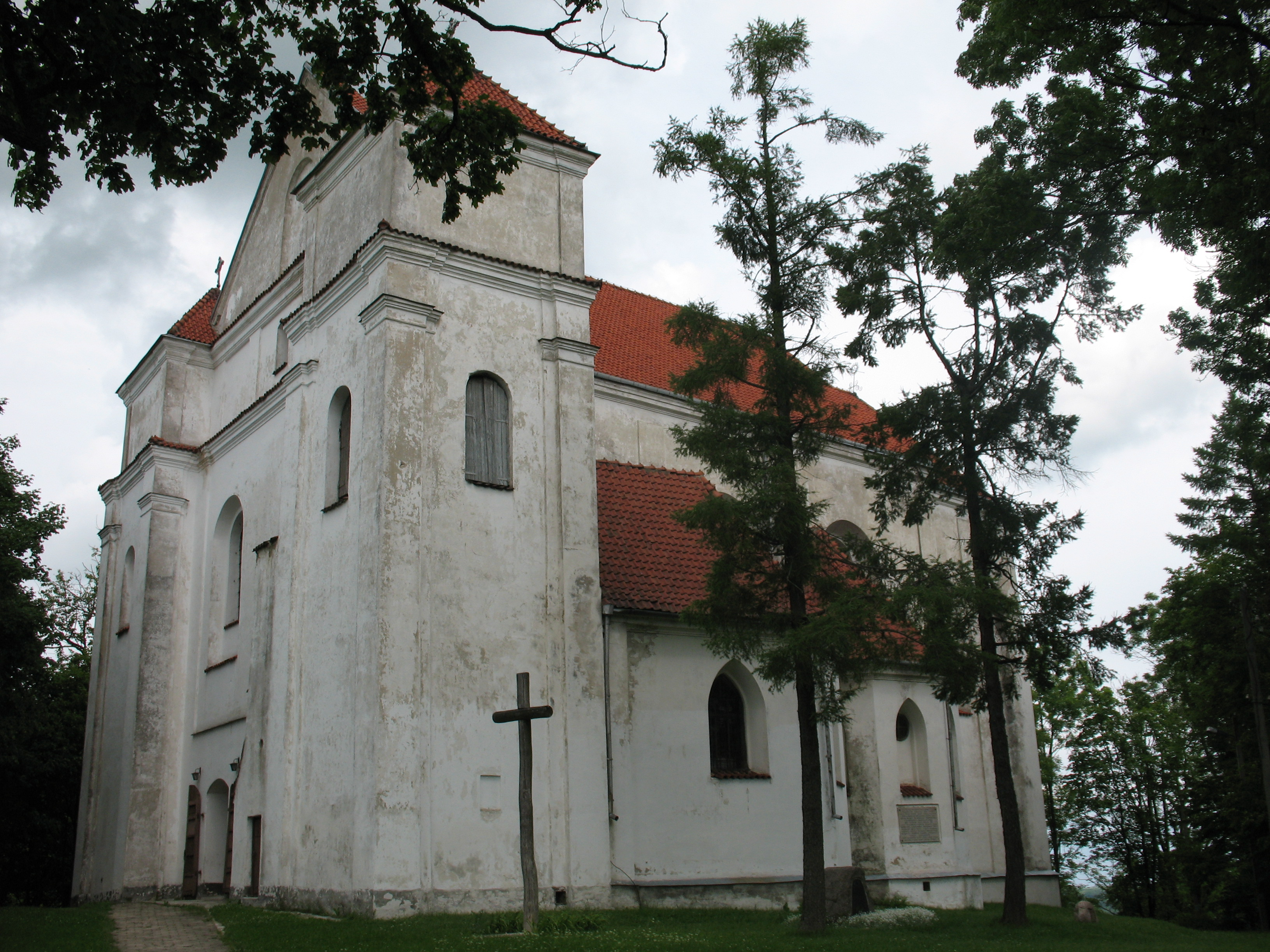 Беларуская (тарашкевіца): Фарны касьцёл з надмагільным помнікам загінулым у бітве пад Хоцінам у 1621 годзе. г. Наваградак This is a photo of Belarusian heritage monument. Reference number: 411Г000403 ( WLM)